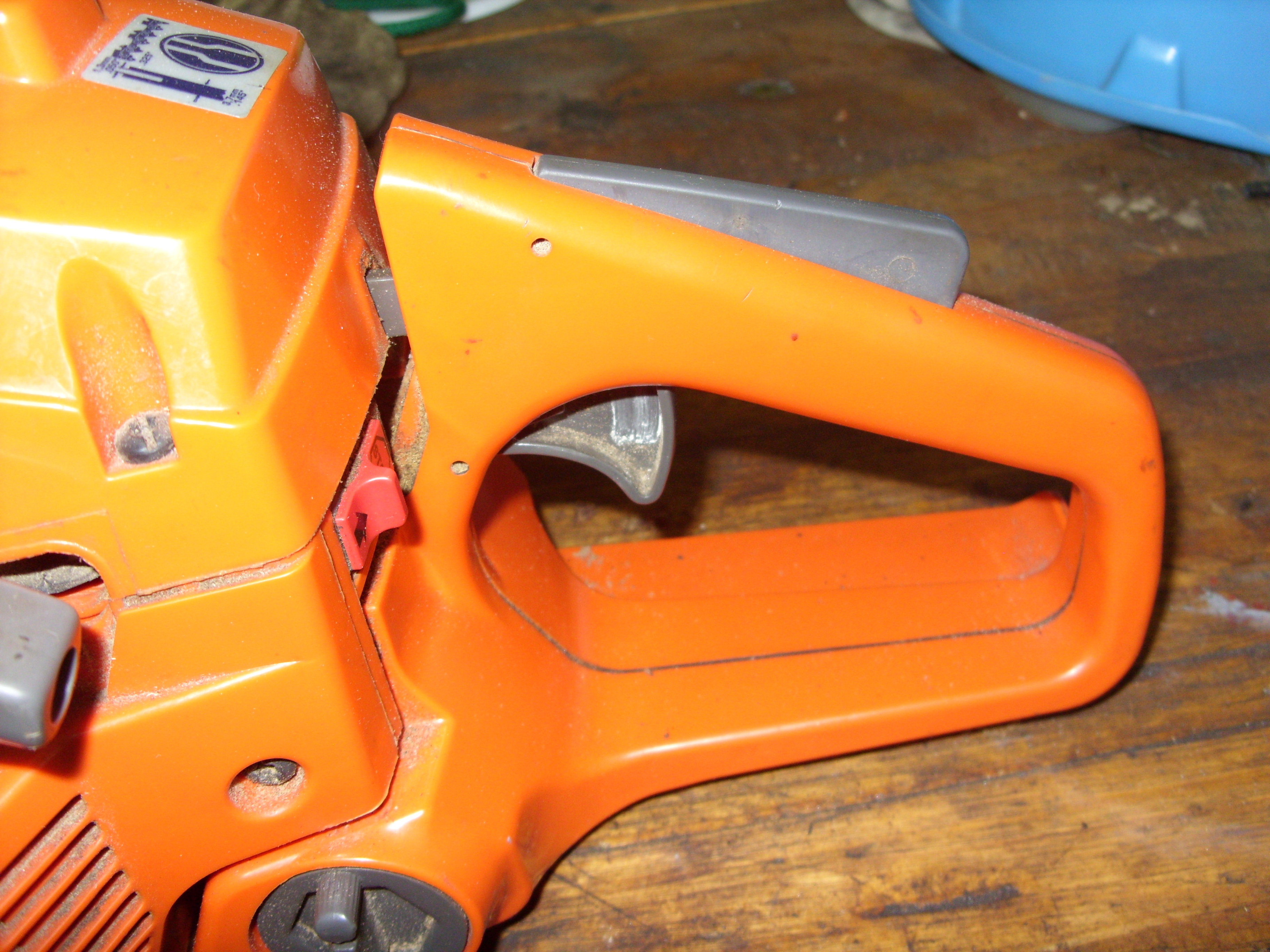 Na sliki je prikazan varnostni gumb na zgornjem delu ročaja, ki mora biti aktiviran, če želimo da dodati plin, da se prične veriga vrteti.